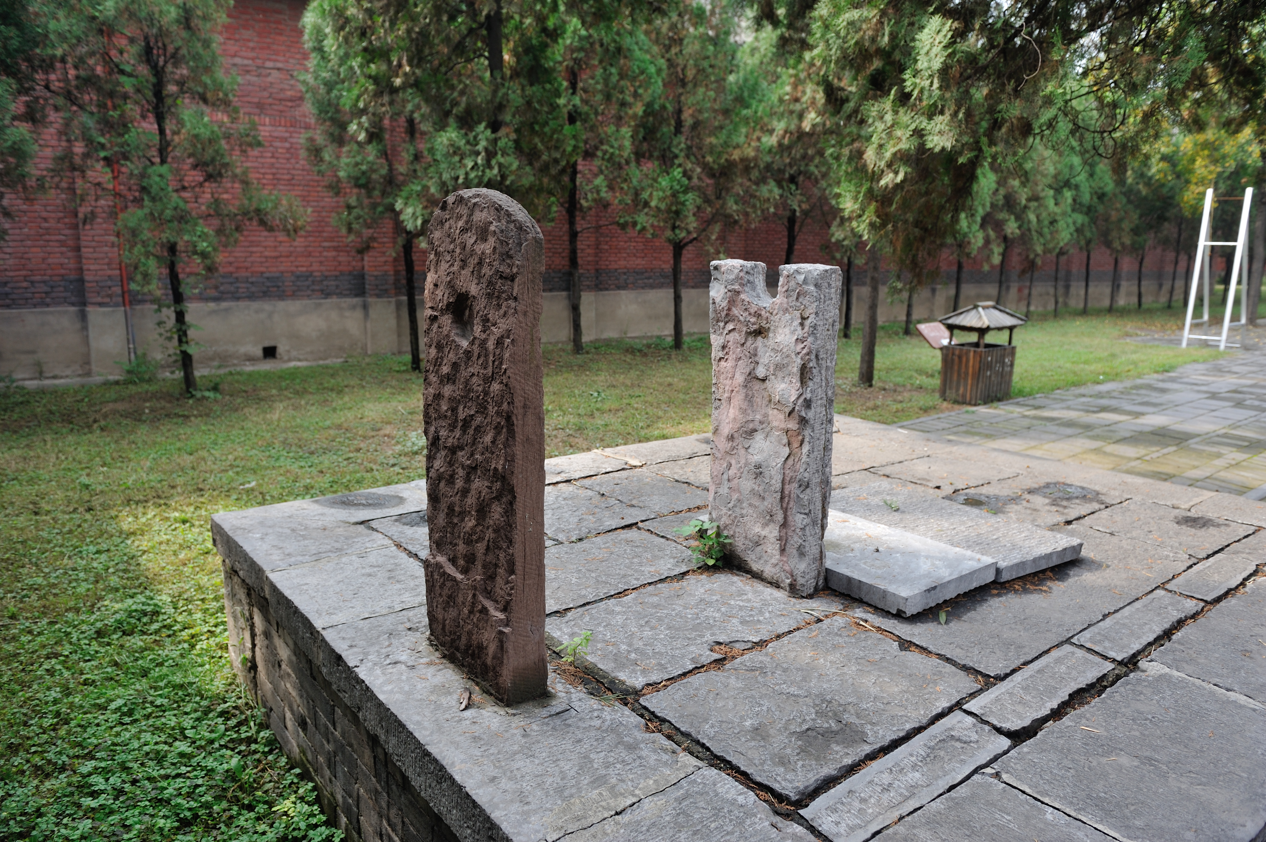 登封周公测景台